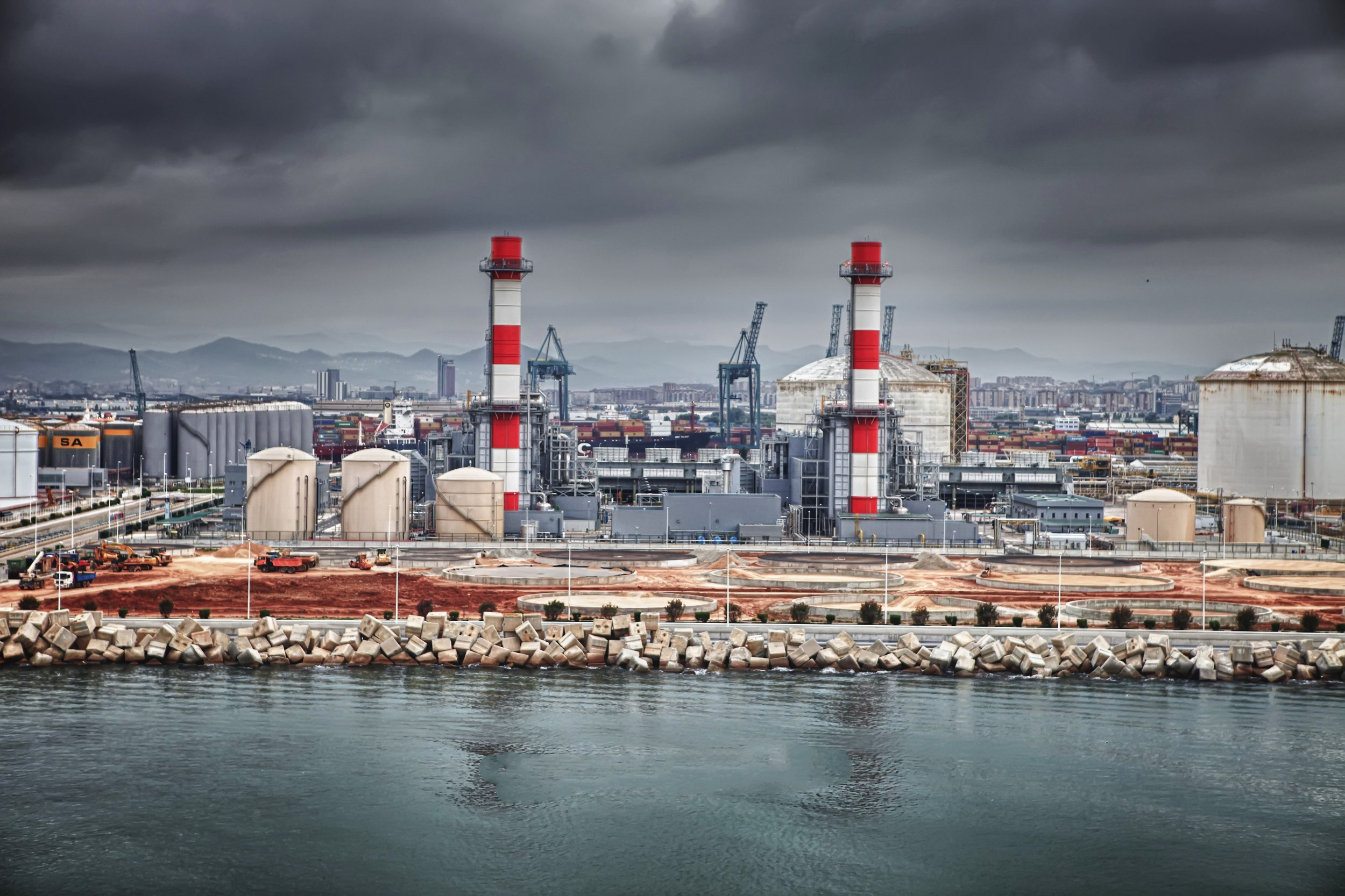 Central Eléctrica de Ciclo Combinado en el Puerto de Barcelona El ciclo combinado del Puerto de Barcelona cuenta con dos grupos generadores de 425 MW cada uno y tendrá un rendimiento por encima del 57%, muy superior al de una central convencional, han destacado fuentes de la compañía Gas Natural Fenosa.